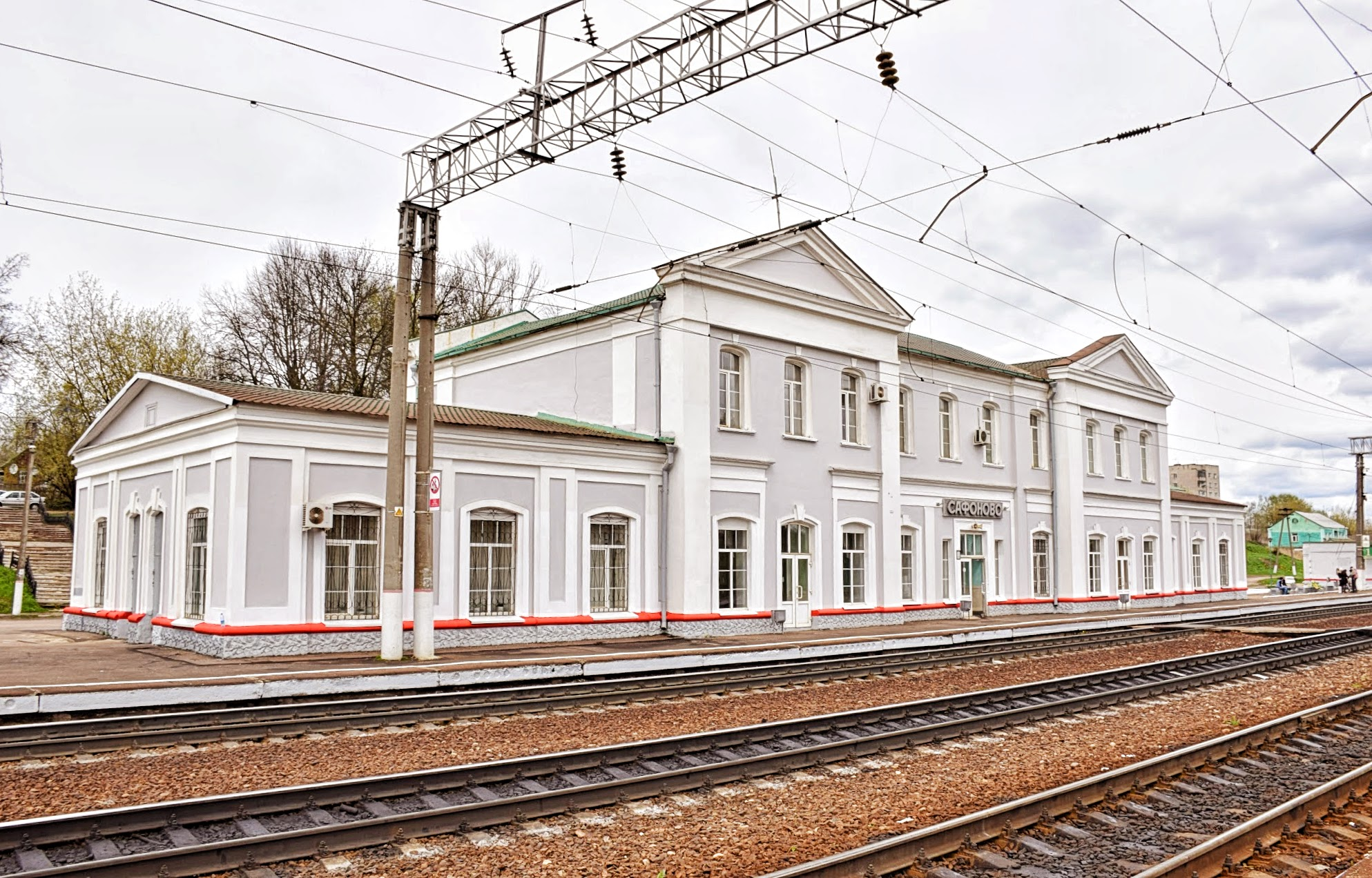 Вокзал: улица Привокзальная, Сафоново, Сафоновский район, Смоленская область